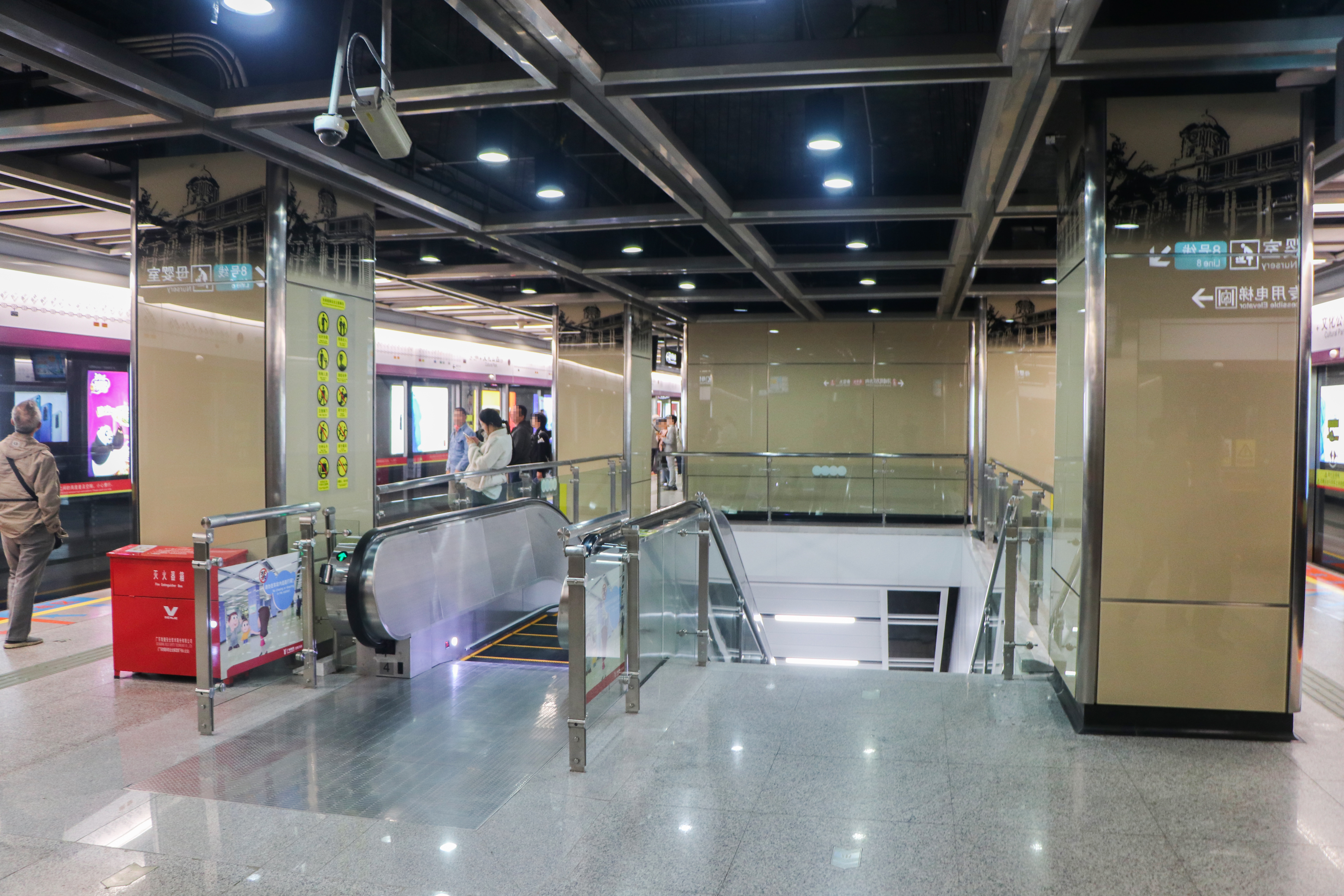 广州地铁文化公园站